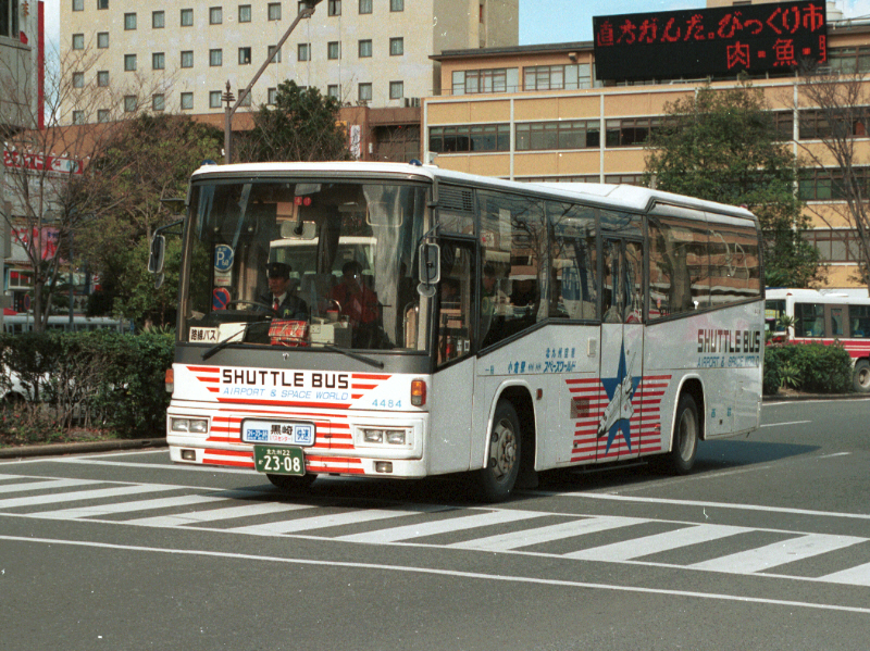 小倉－スペースワールド・北九州空港に使われていた車両 元アジア太平洋博覧会（よかトピア）でのガイドウェイバス